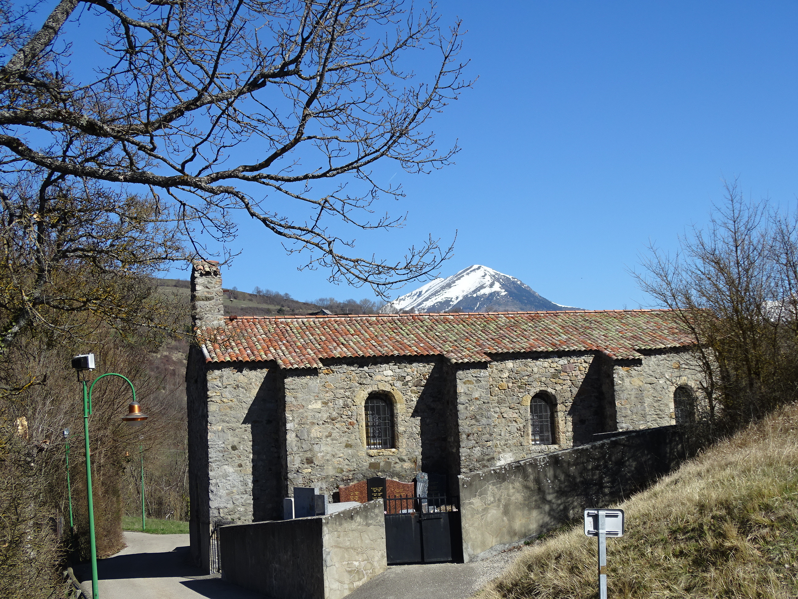 Chapelle de Cognet 23 mars 2019